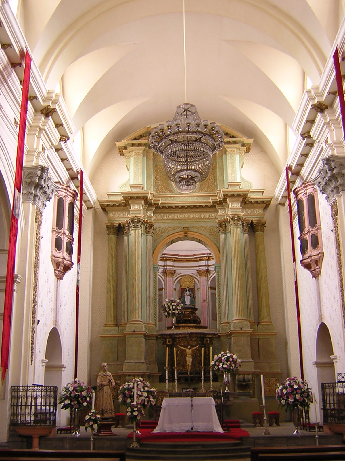 altar mayor de san francisco Popayán